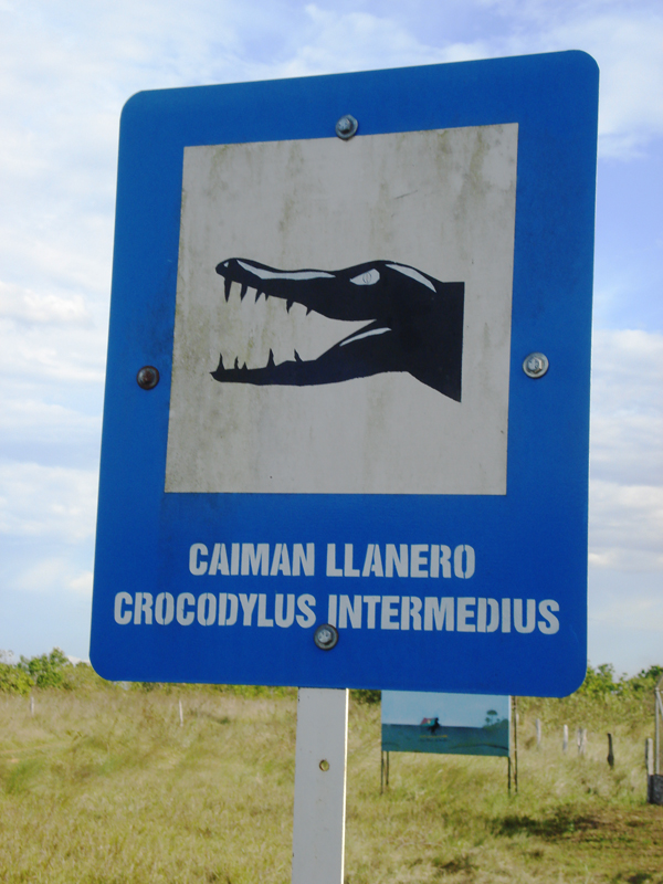 Panneau signalant un risque de rencontrer un Crocodile de l'Orénoque.